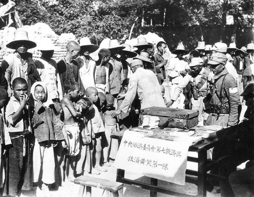 鄭州附近，中國國民政府中央救濟委員會第七救濟區救濟黃災第一隊